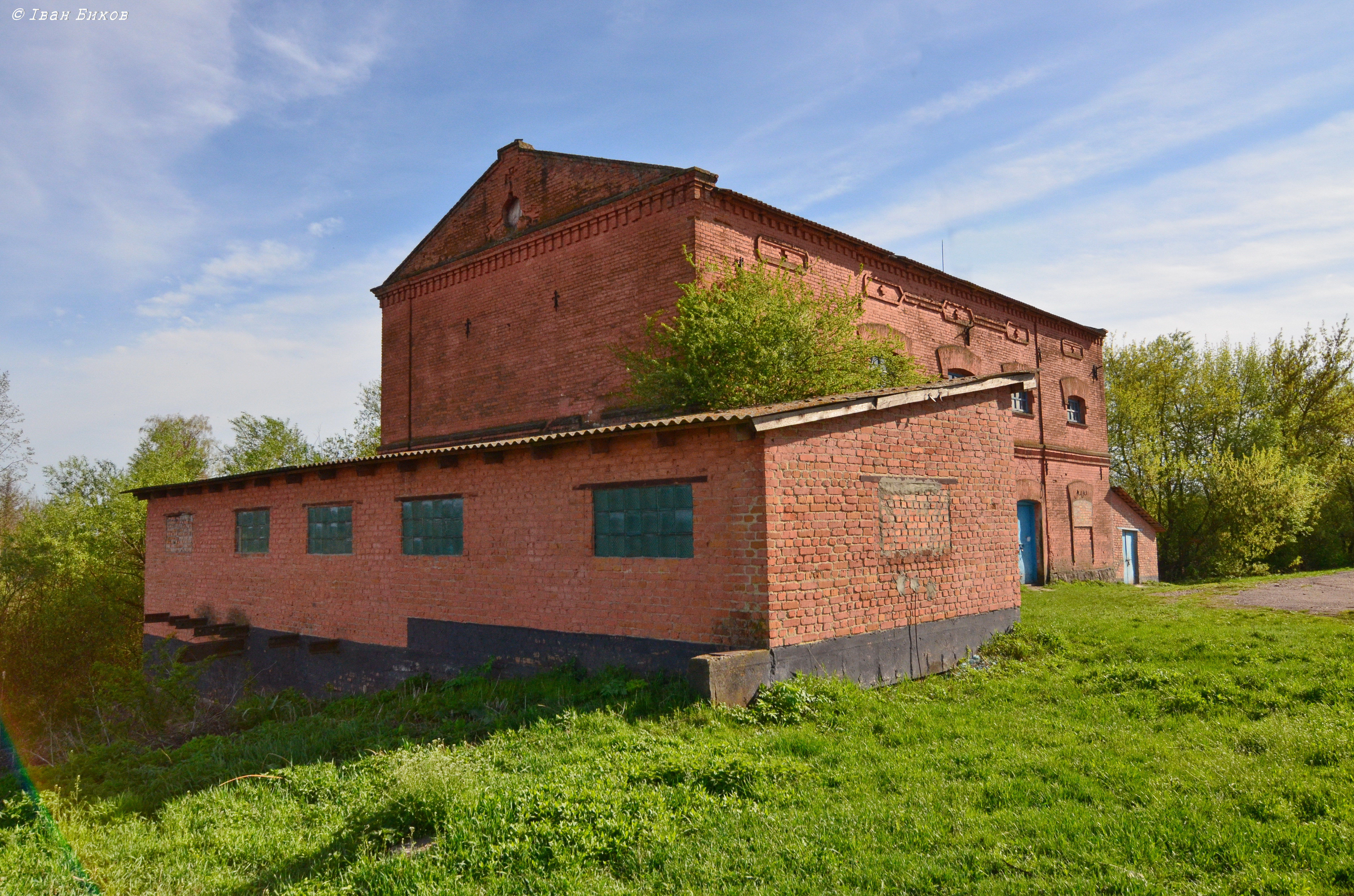 Водяний млин (мур.), село Березна